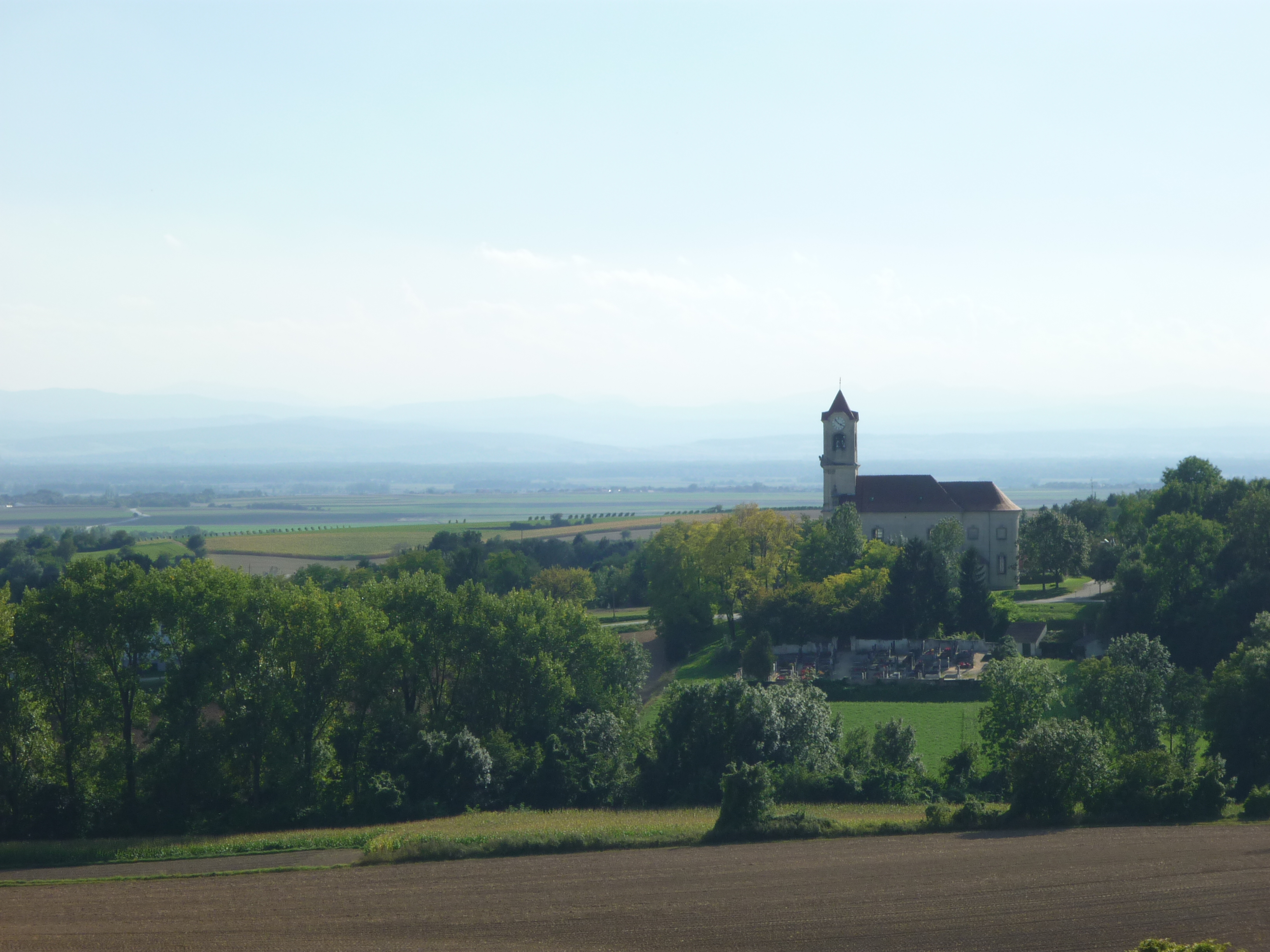 Katholische Pfarrkirche hl. Peter und Paul in Stranzendorf, aufgenommen vom Weg zum Altenberg